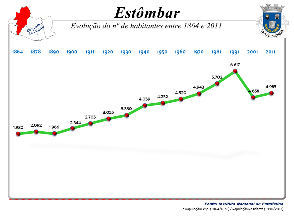 Censos 1864/2011